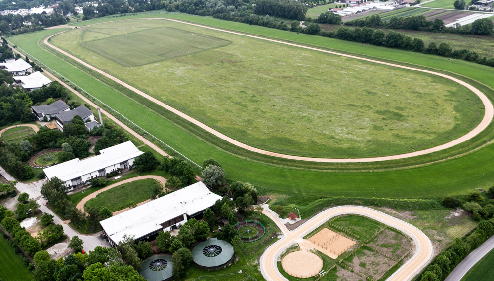 Galopprennbahn Riem